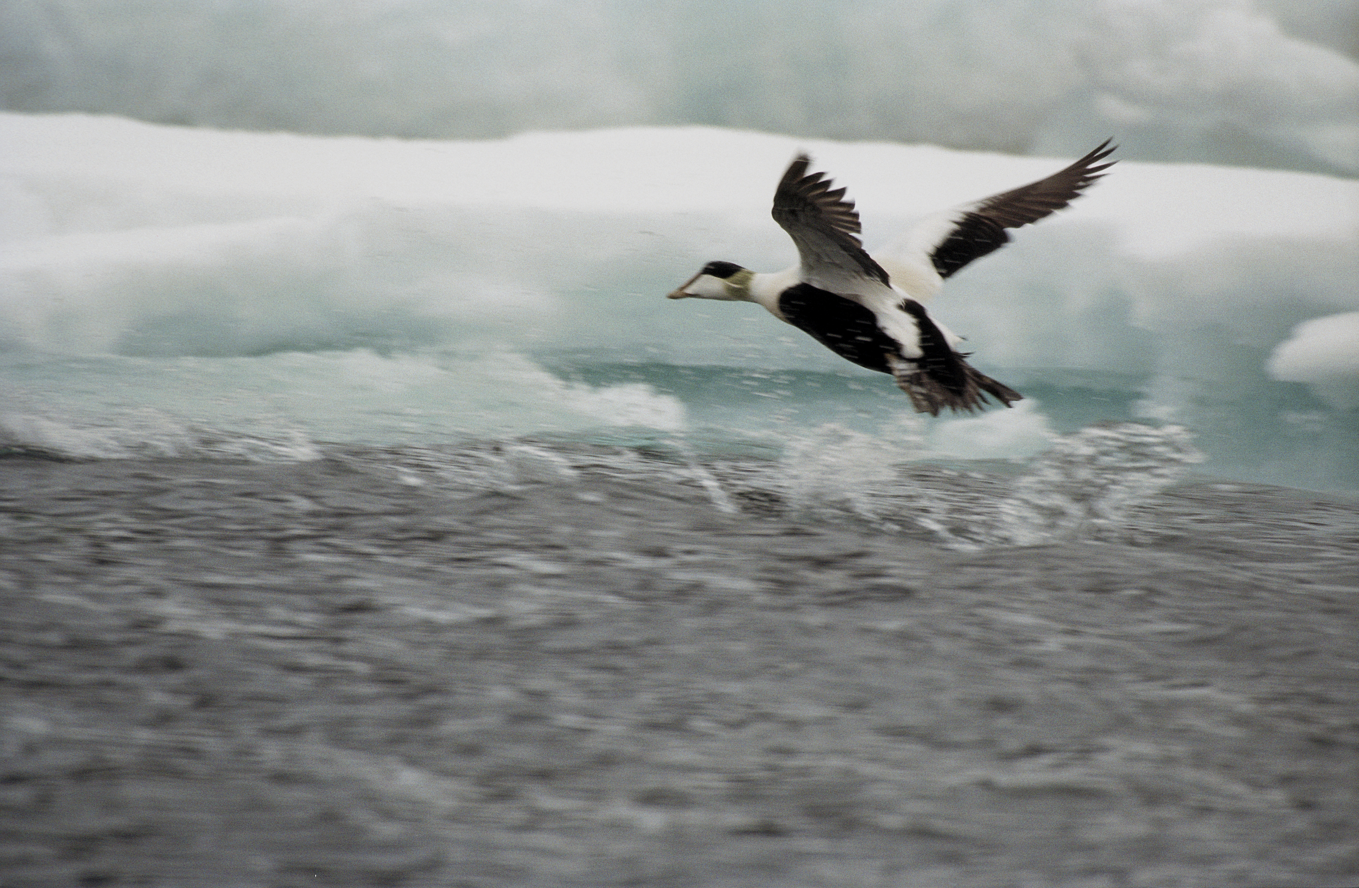 Somateria mollissima,Spitsbergen